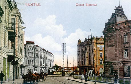 Српски (ћирилица): Хотел Бристол, Београд